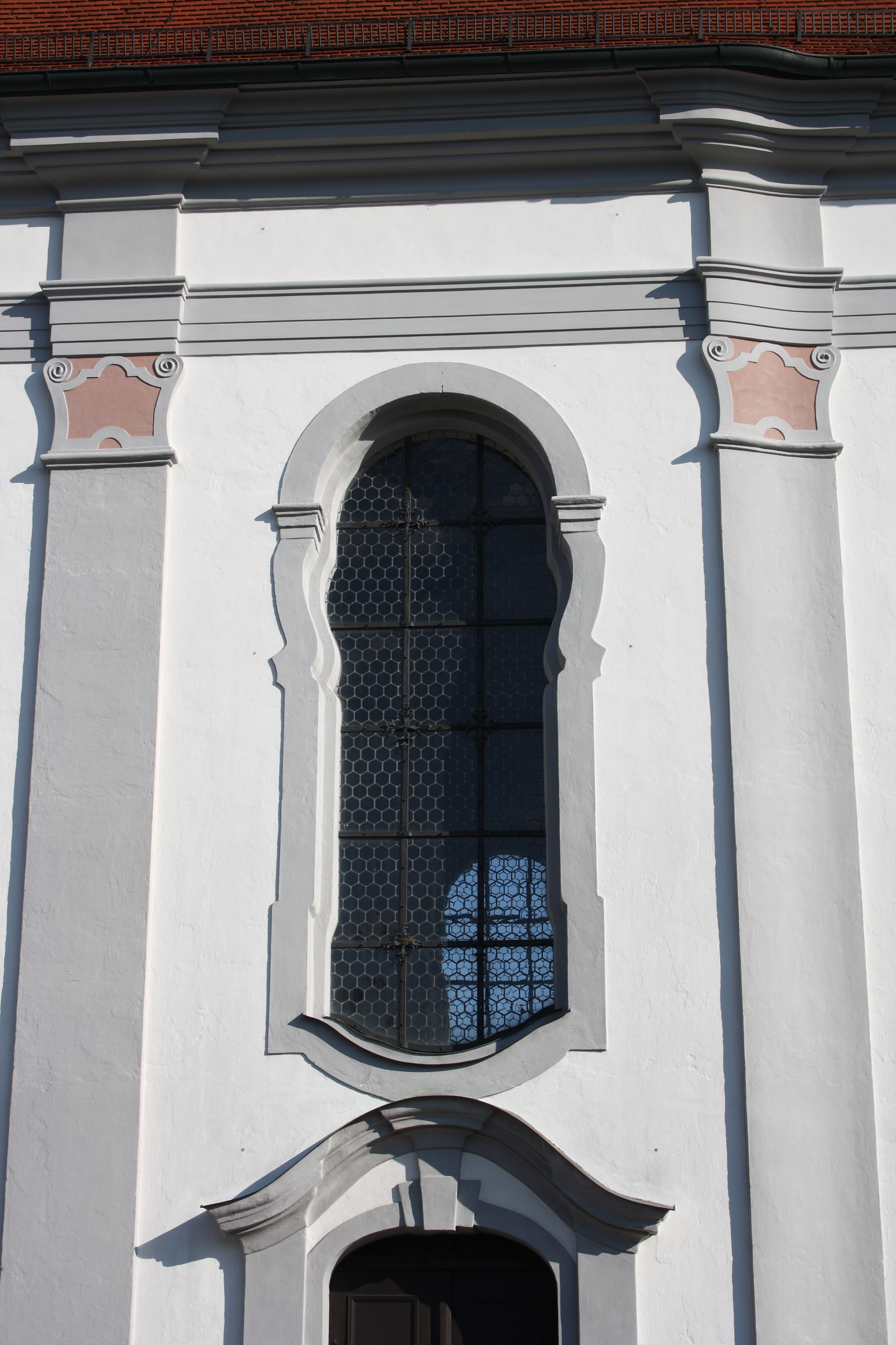 Katholische Pfarrkirche St. Peter in Tapfheim im Landkreis Donau-Ries (Bayern)